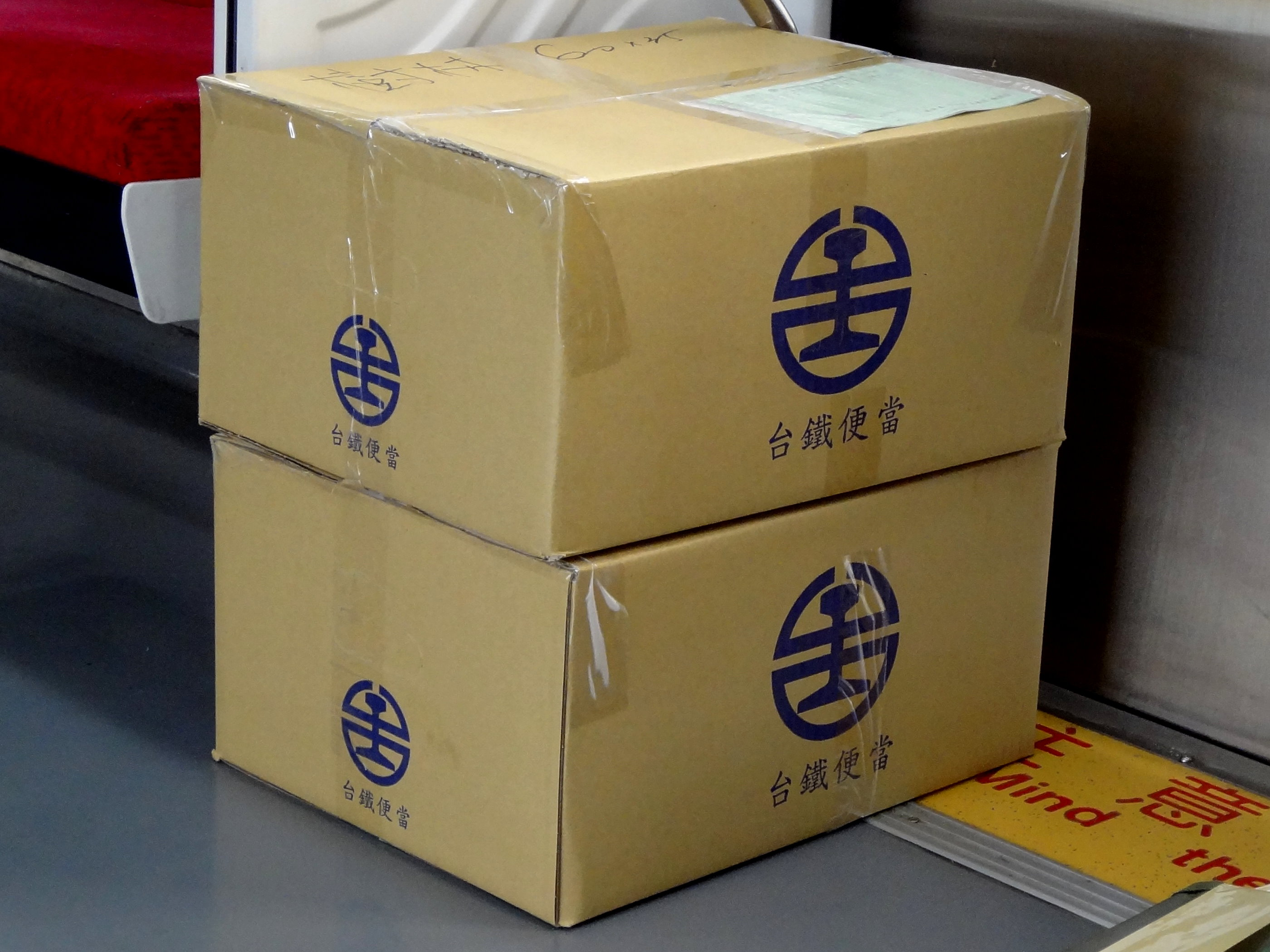 臺灣鐵路管理局EMU700型電聯車載運台鐵便當5箱，此為其中2箱。